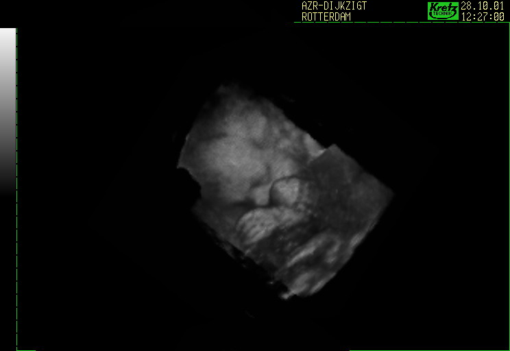 Zelfgemaakt van onze dochter.